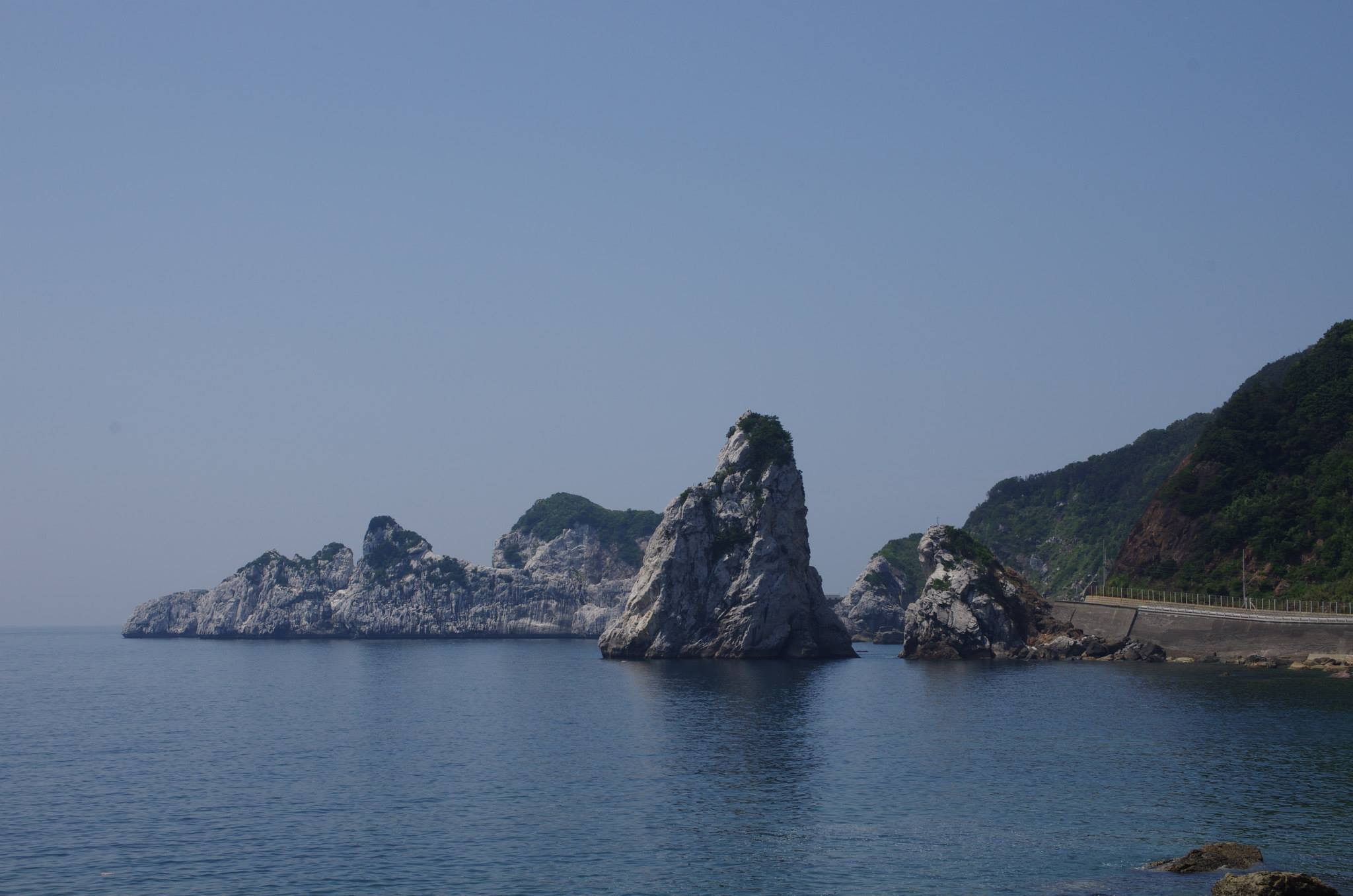 白崎海岸（2015.8.5）